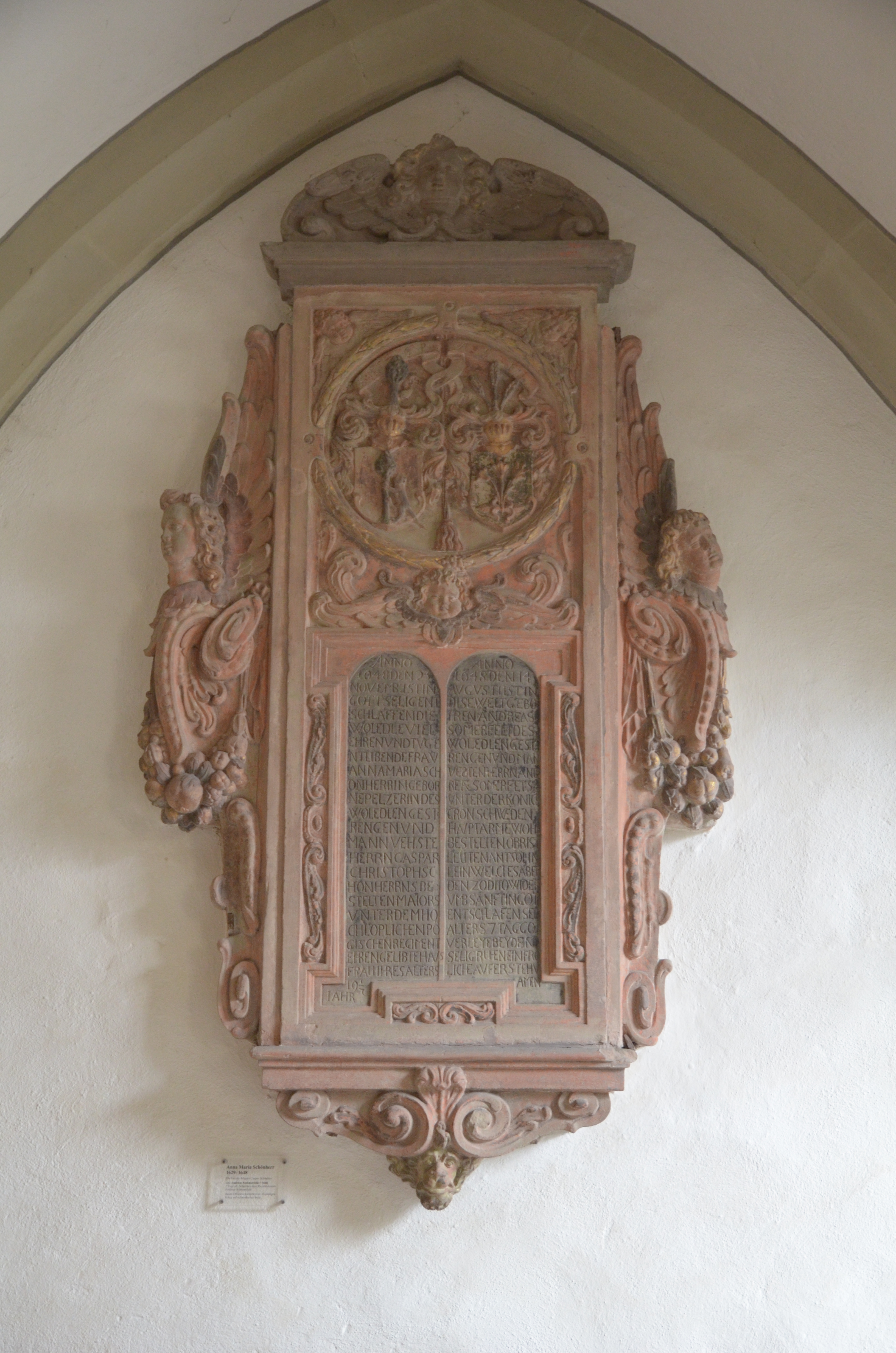 St. Johannis Schweinfurt, Epitaph Anna Maria Schönherr und Andreas Sommerfeld 1648